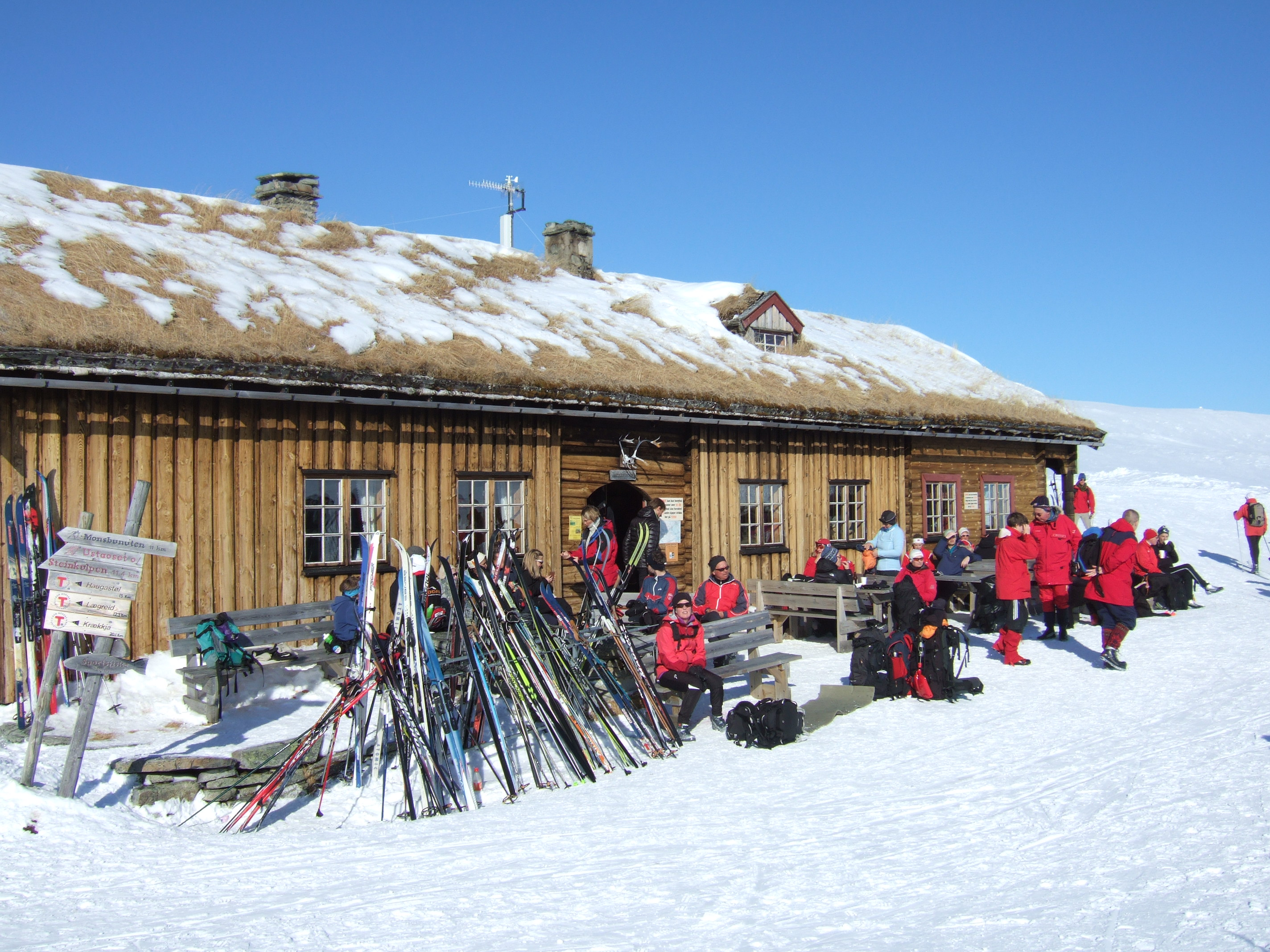 Betjent turisthytte på Hardangervidda. Bilde tatt påsken 2013.